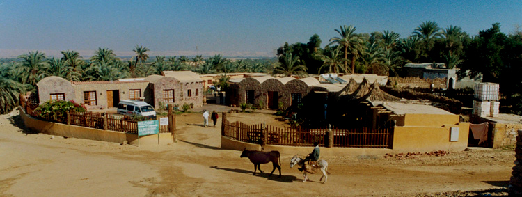 Oase Bahariyya